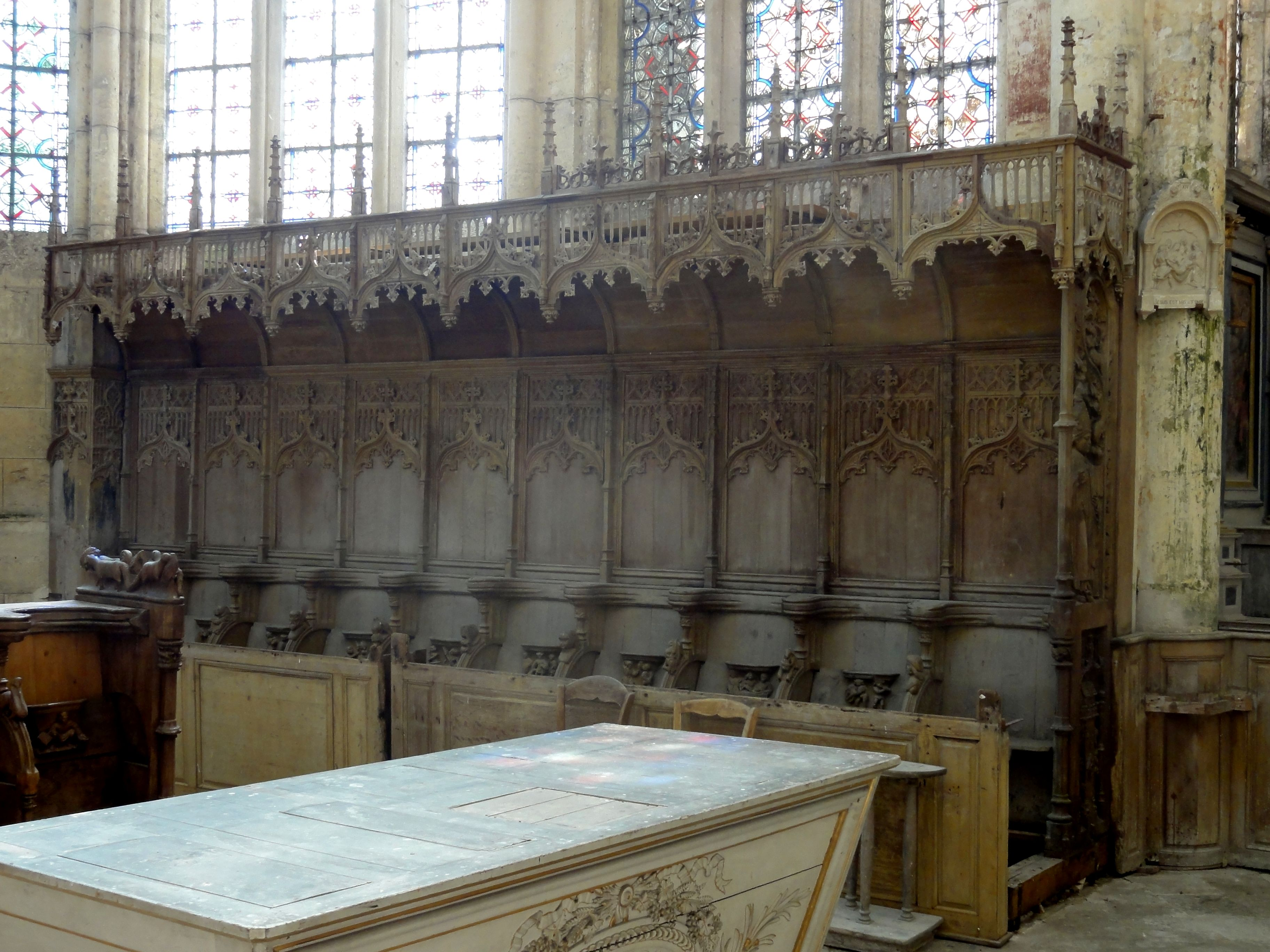 Les stalles de droite.